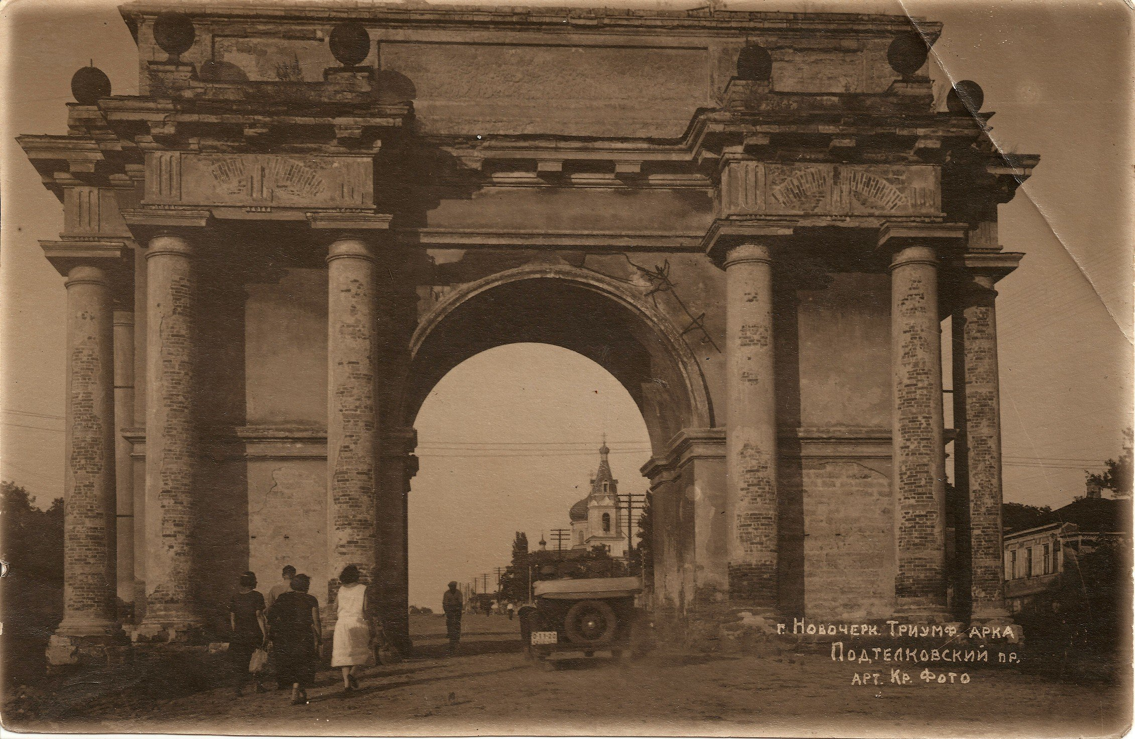 Западная триумфальная арка в Новочеркасске около 1930 года